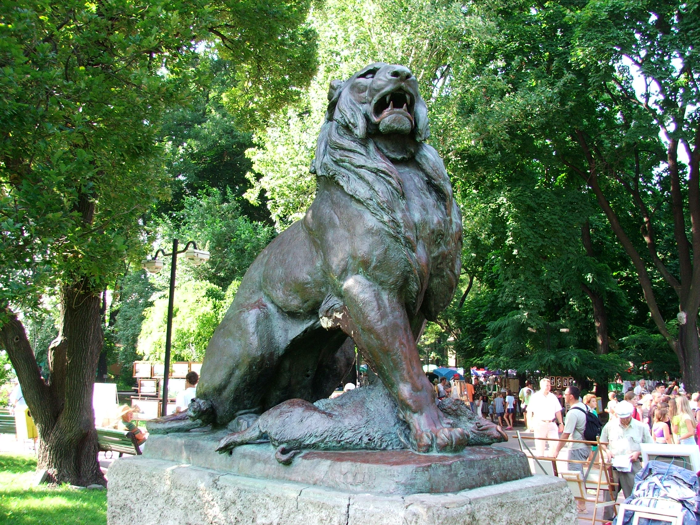 Odessa Ukraine